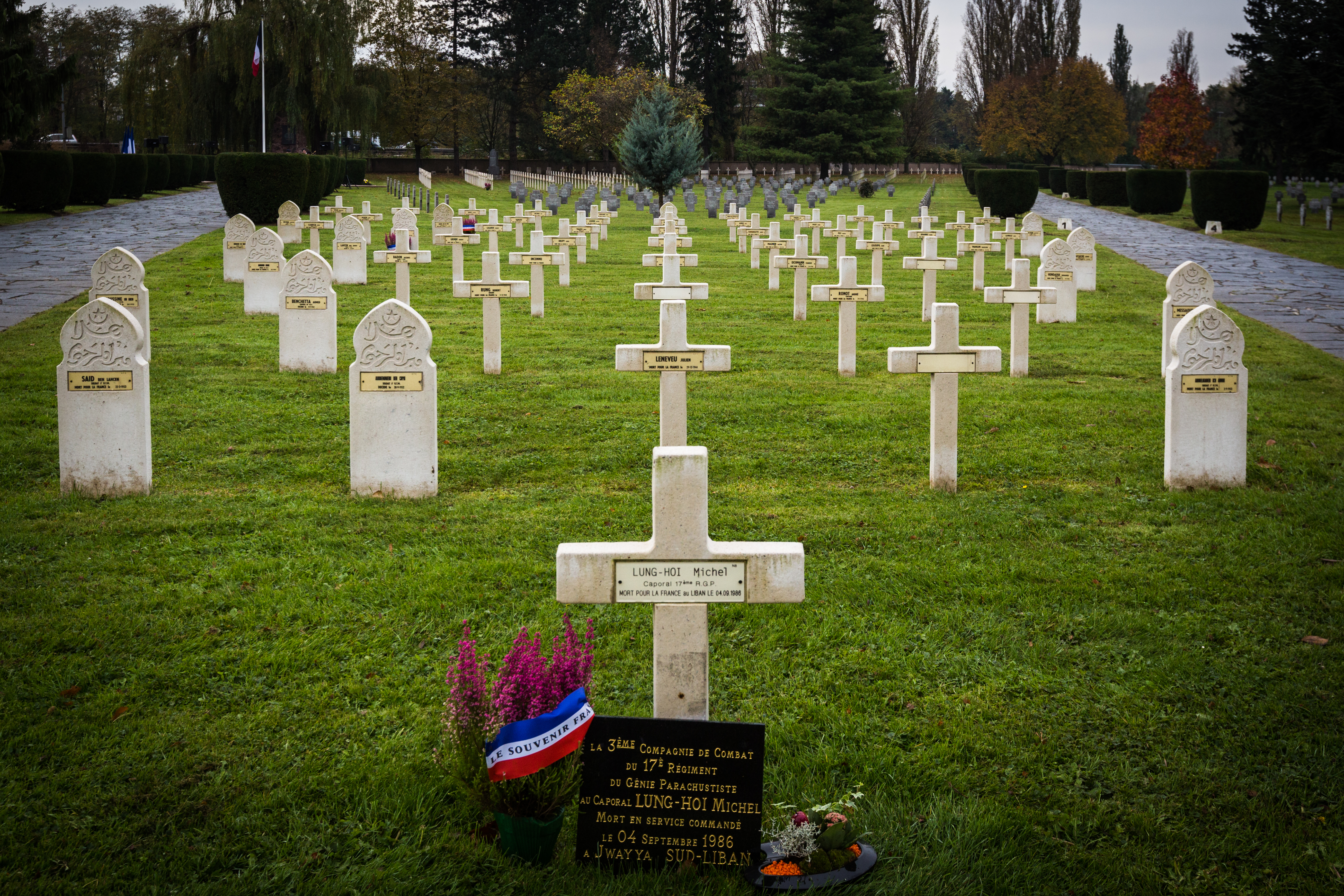 Strasbourg, nécropole nationale de Cronenbourg. Cérémonie du 1er novembre 2013.